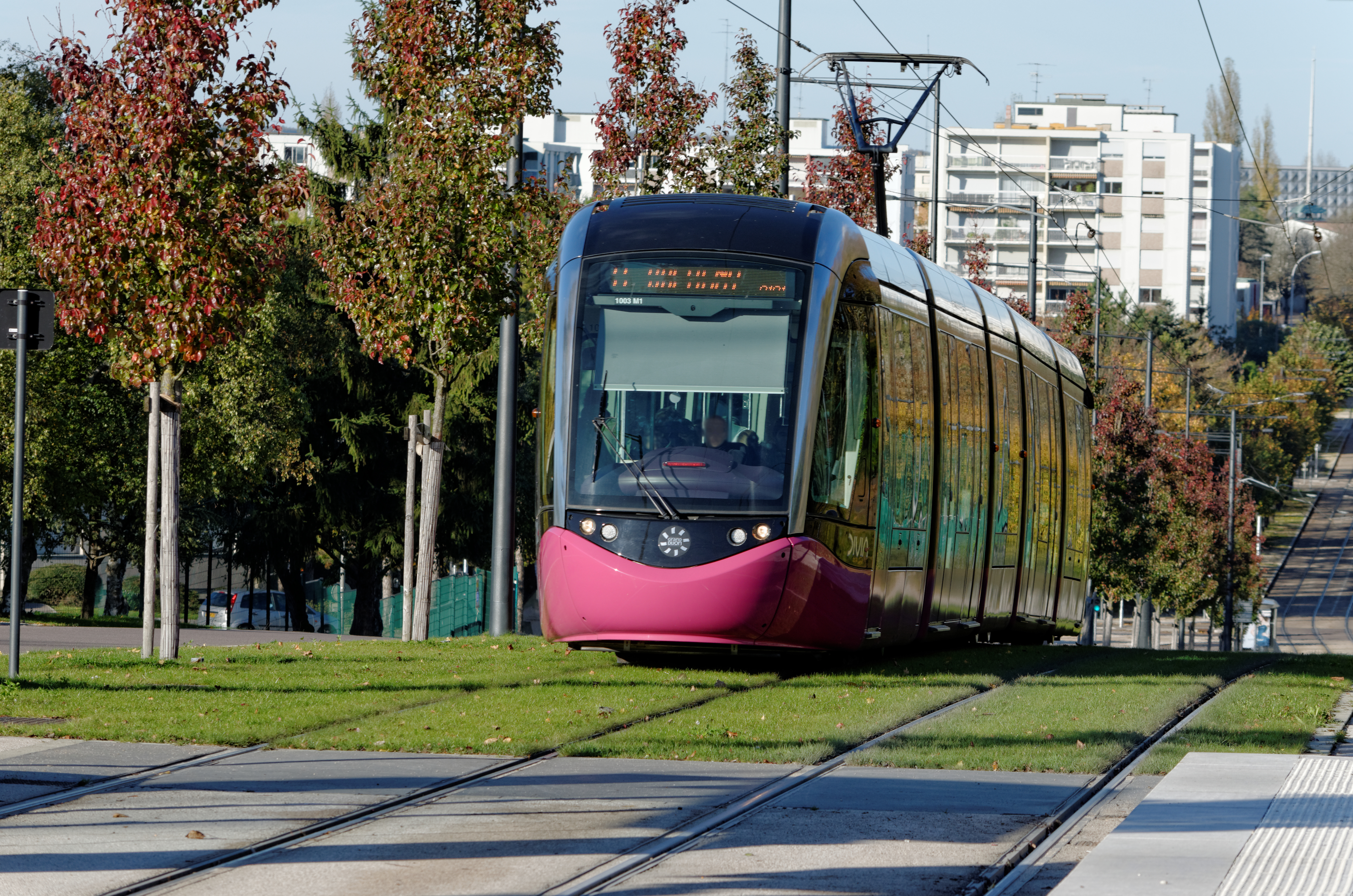 Arrivée du tramway à la station "Parc des sports", boulevard Louis Joseph Trimolet à Dijon